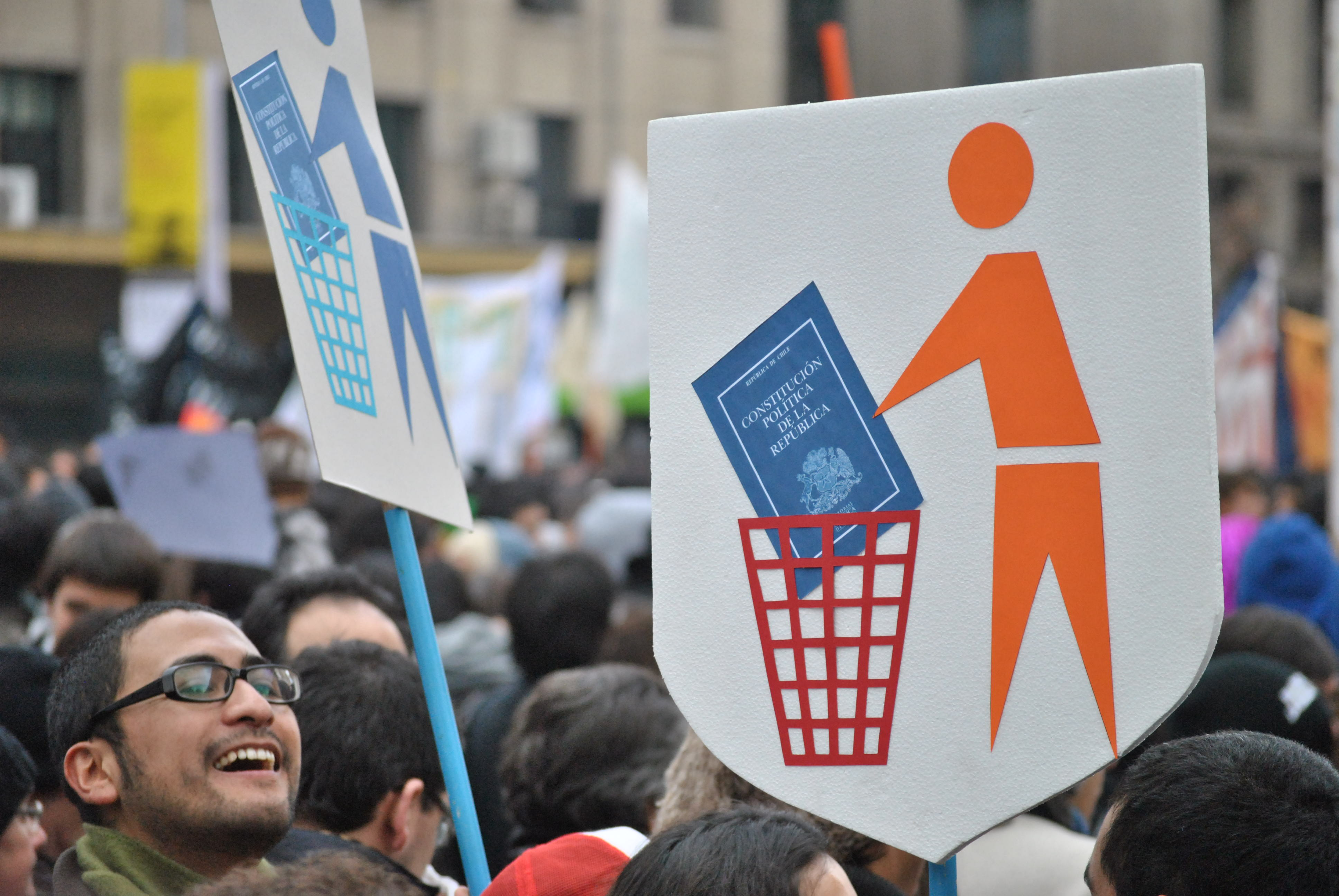 Movilización estudiantil de 2011 en Chile: marcha del 30 de junio de 2011.¿Quien dijo que los cabros de @derechouchile no podían ser artistas?